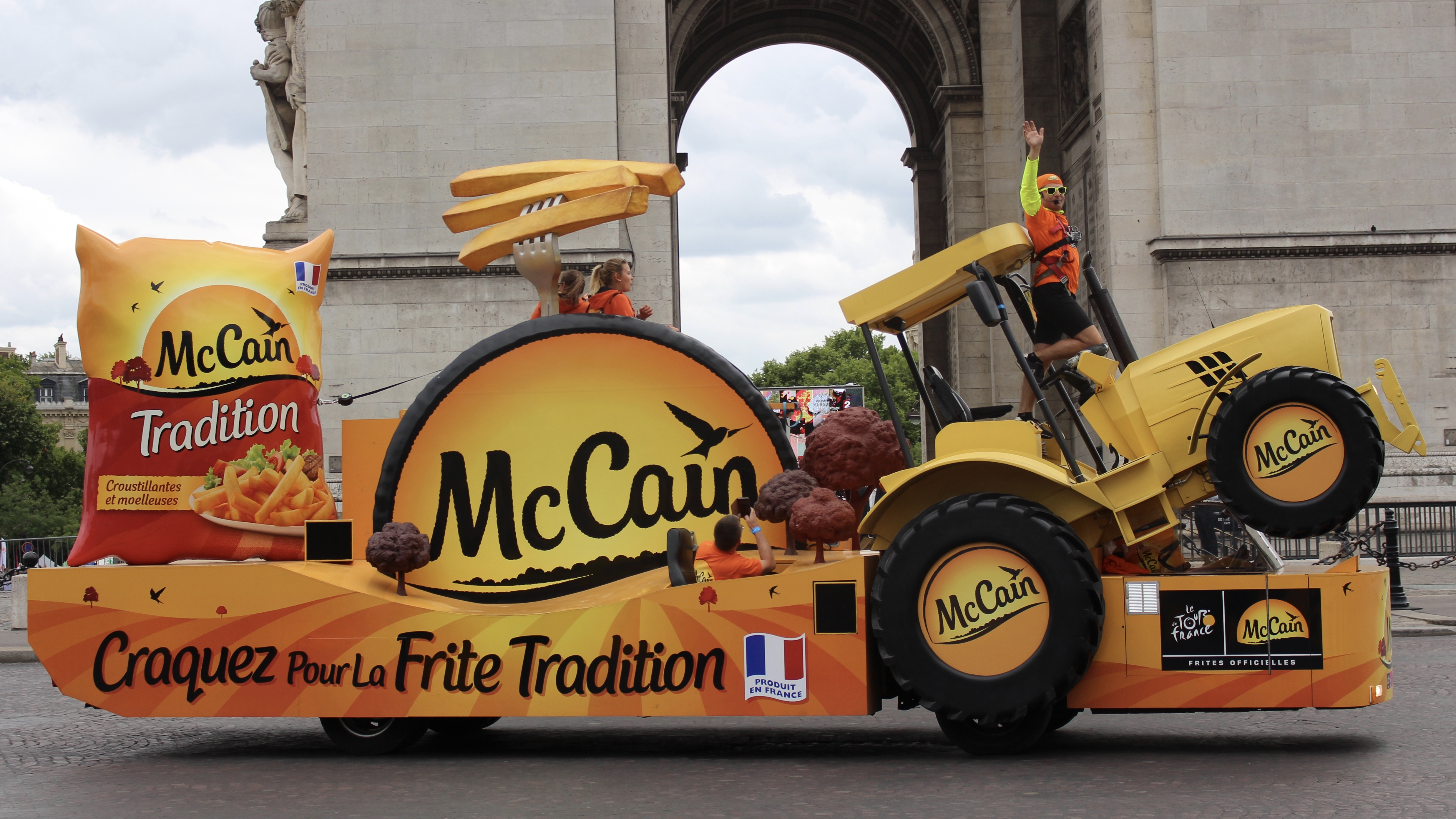 Véhicule de la caravane du Tour de France le 23 juillet 2017 sur le rond-point de l'Arc de Triomphe à Paris.